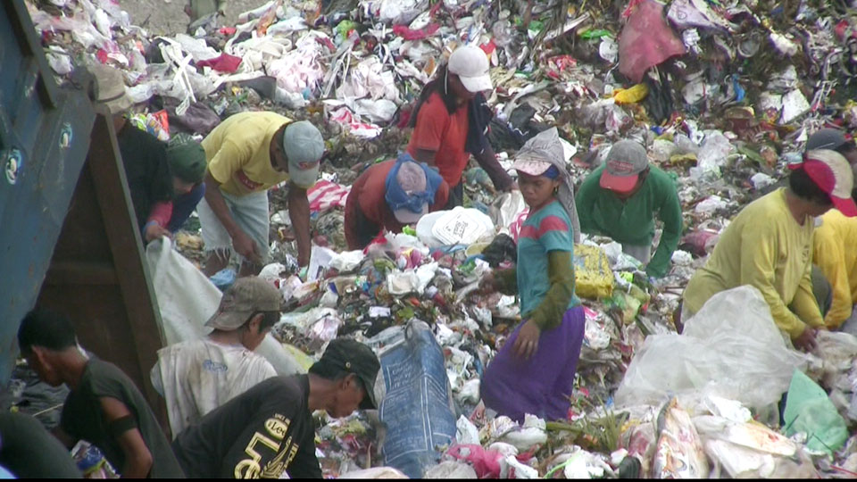 Payatas Dumpsite, Metro Manila, Philippines